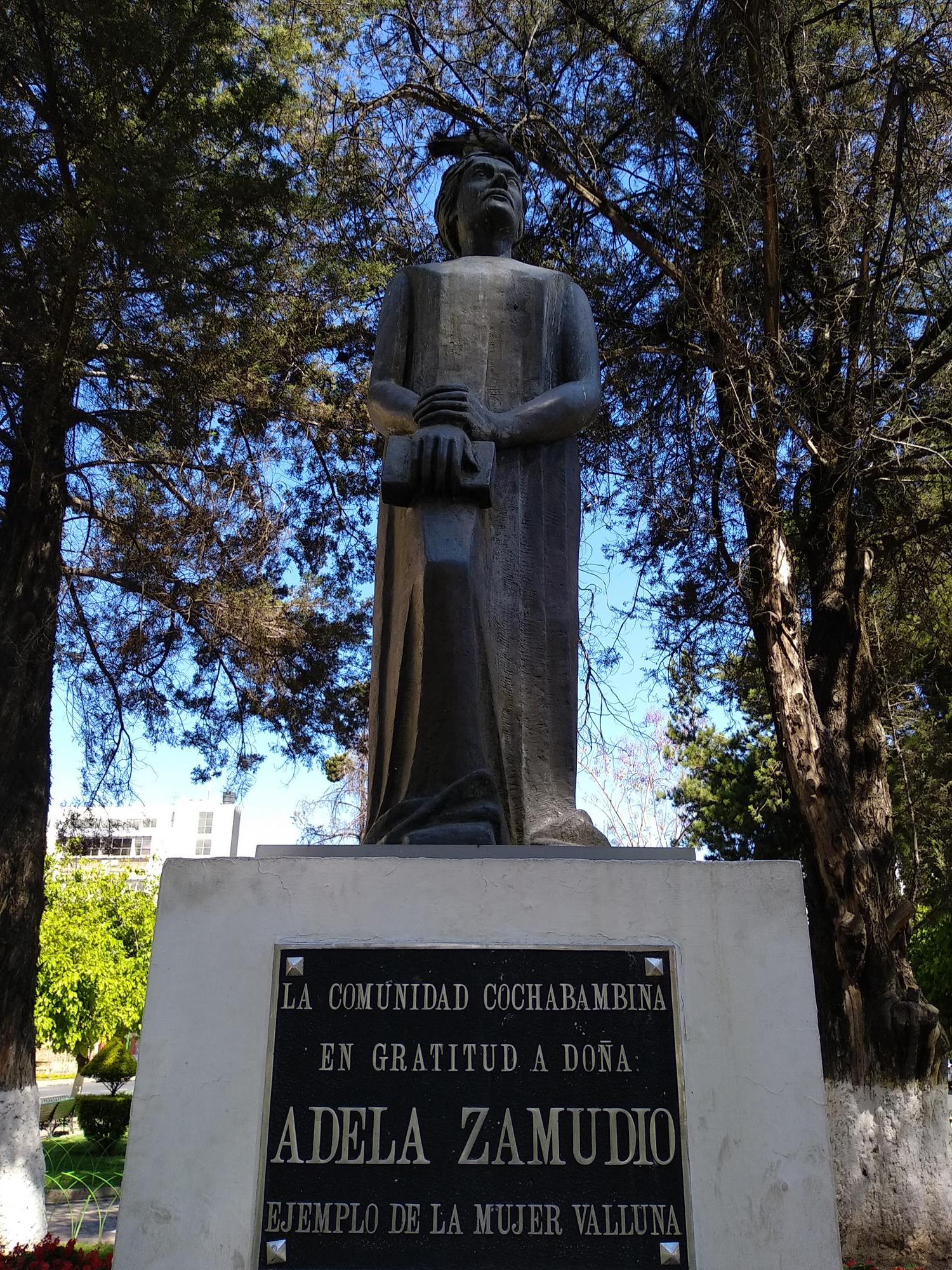 Adela Zamudio This medium shows the protected monument with the number C/00-371 in Bolivia.